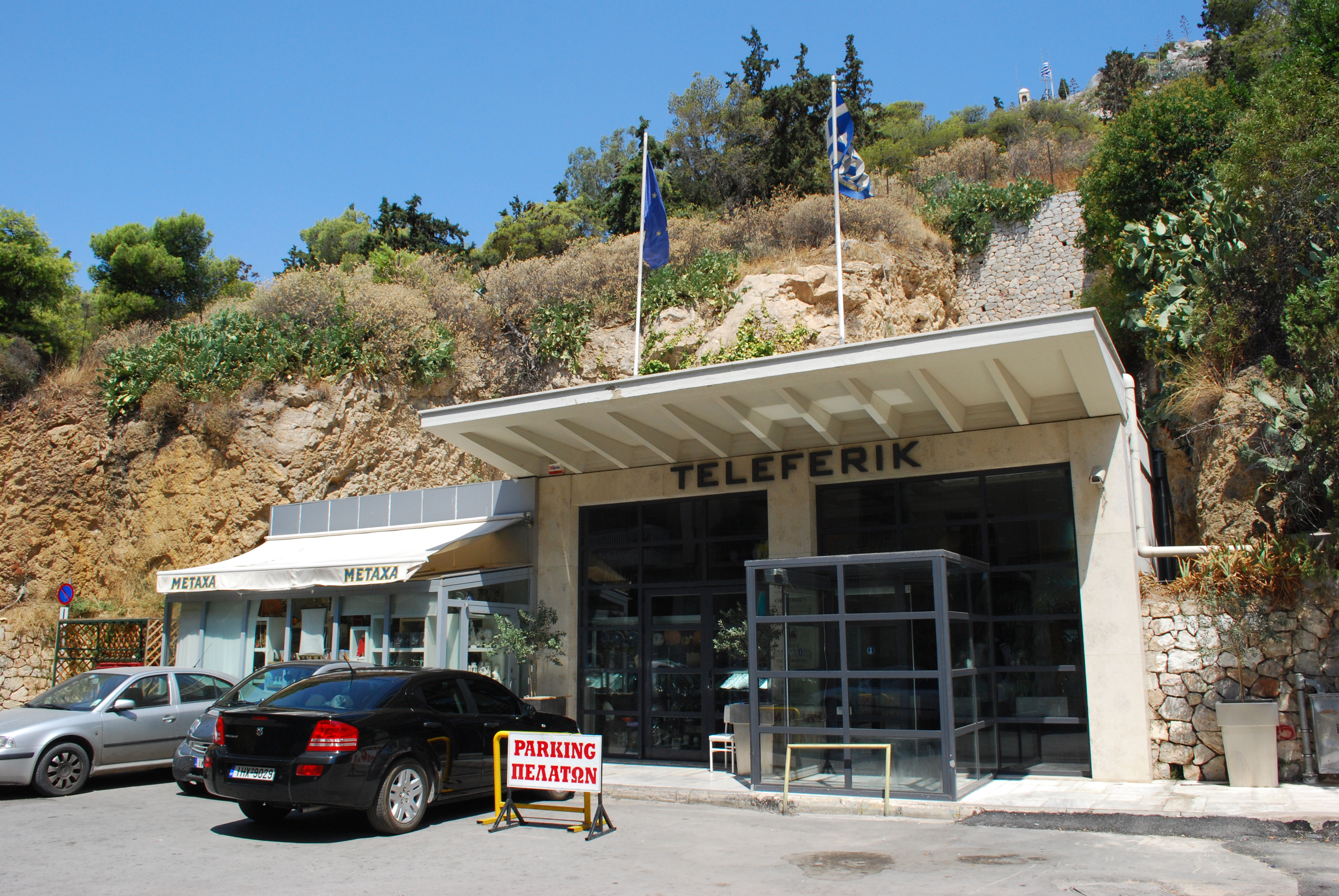 Le funiculaire du Lycabette à Athènes.